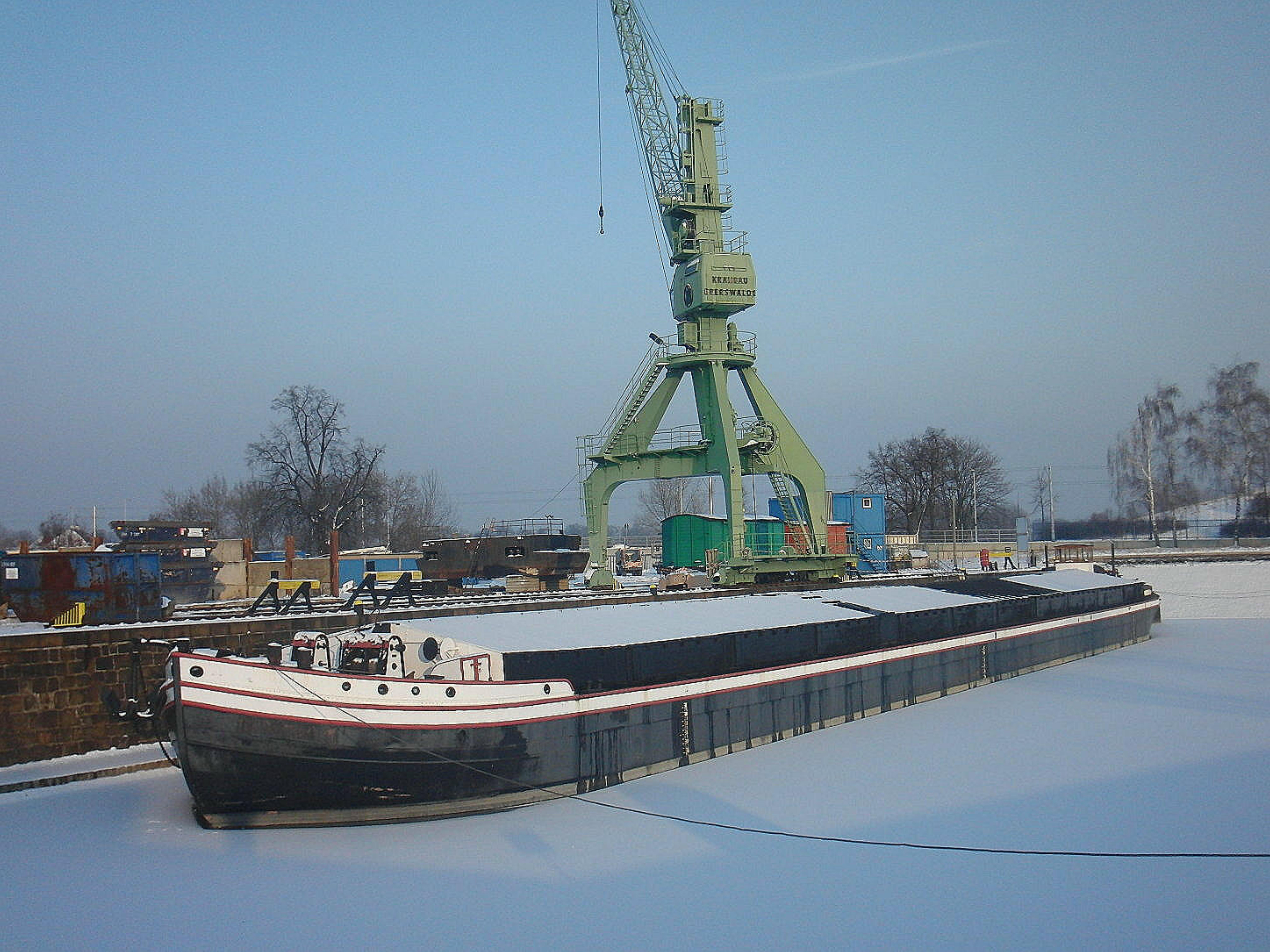 Dresden, Alberthafen, Museumshafen